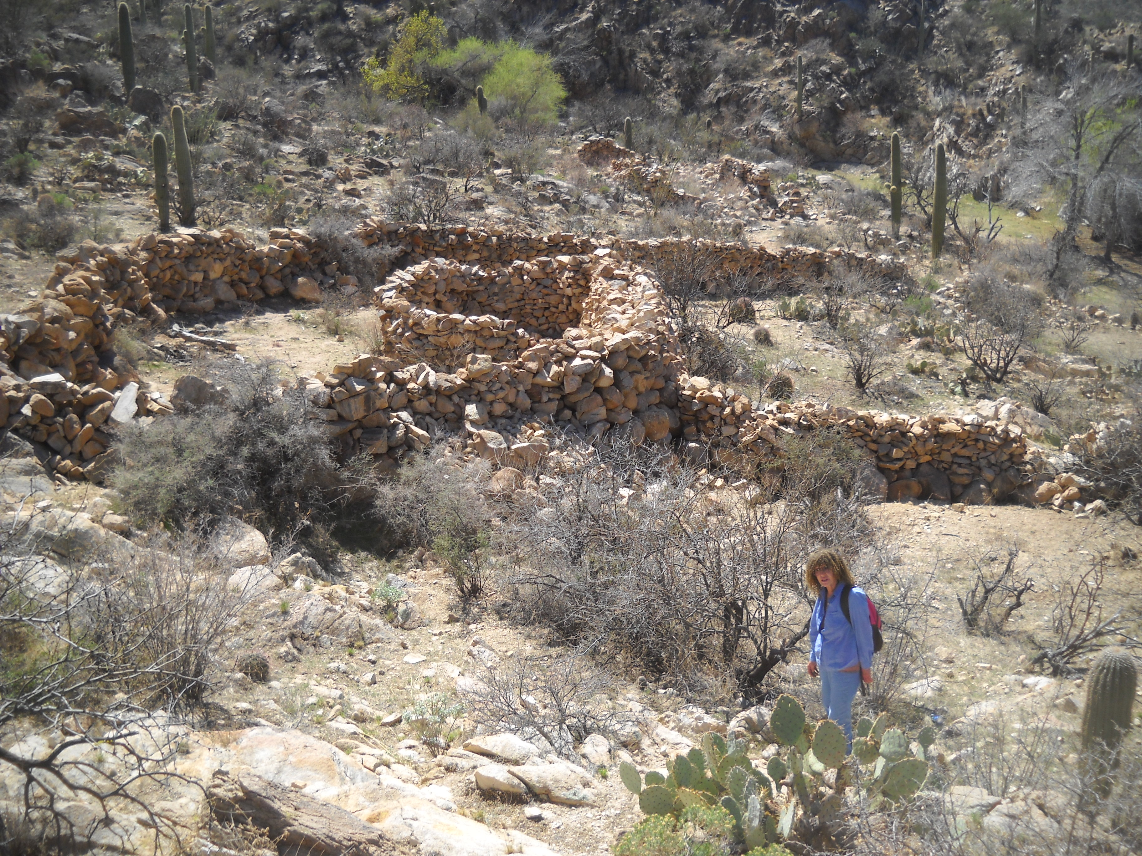 Derrio sheep pens, AZ